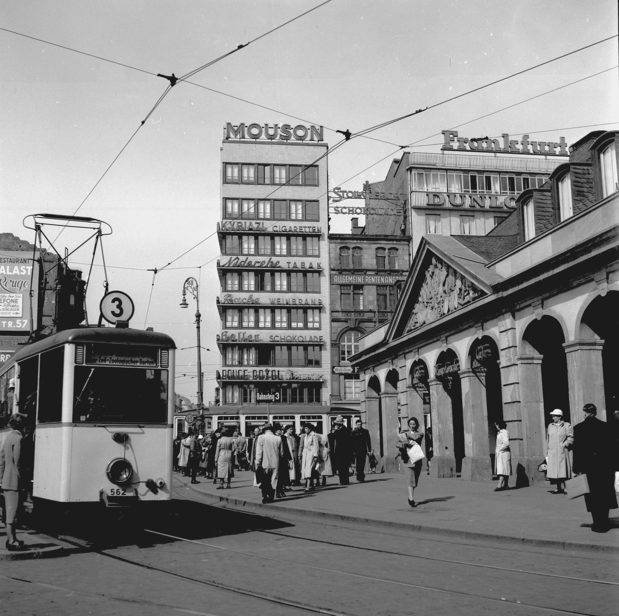 Blick vom Vorplatz der Hauptwache Frankfurt am Main in Richtung Steinweg. In der Mitte das Mouson-Haus. Rechts die Hauptwache und links eine Straßenbahn-Triebwagen der Baureihe I. Die Aufnahme ist etwa Mitte der 1950er Jahre gemacht worden.